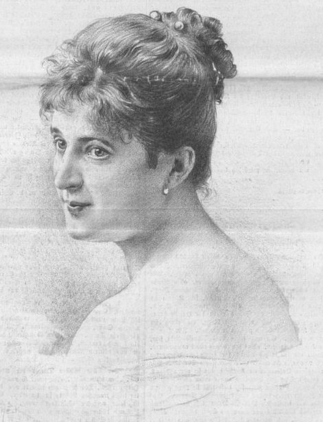 Eugénie Heger-Gasser Österreichische Portraitmalerin Bild: "Der Humorist" 20. Oktober 2020